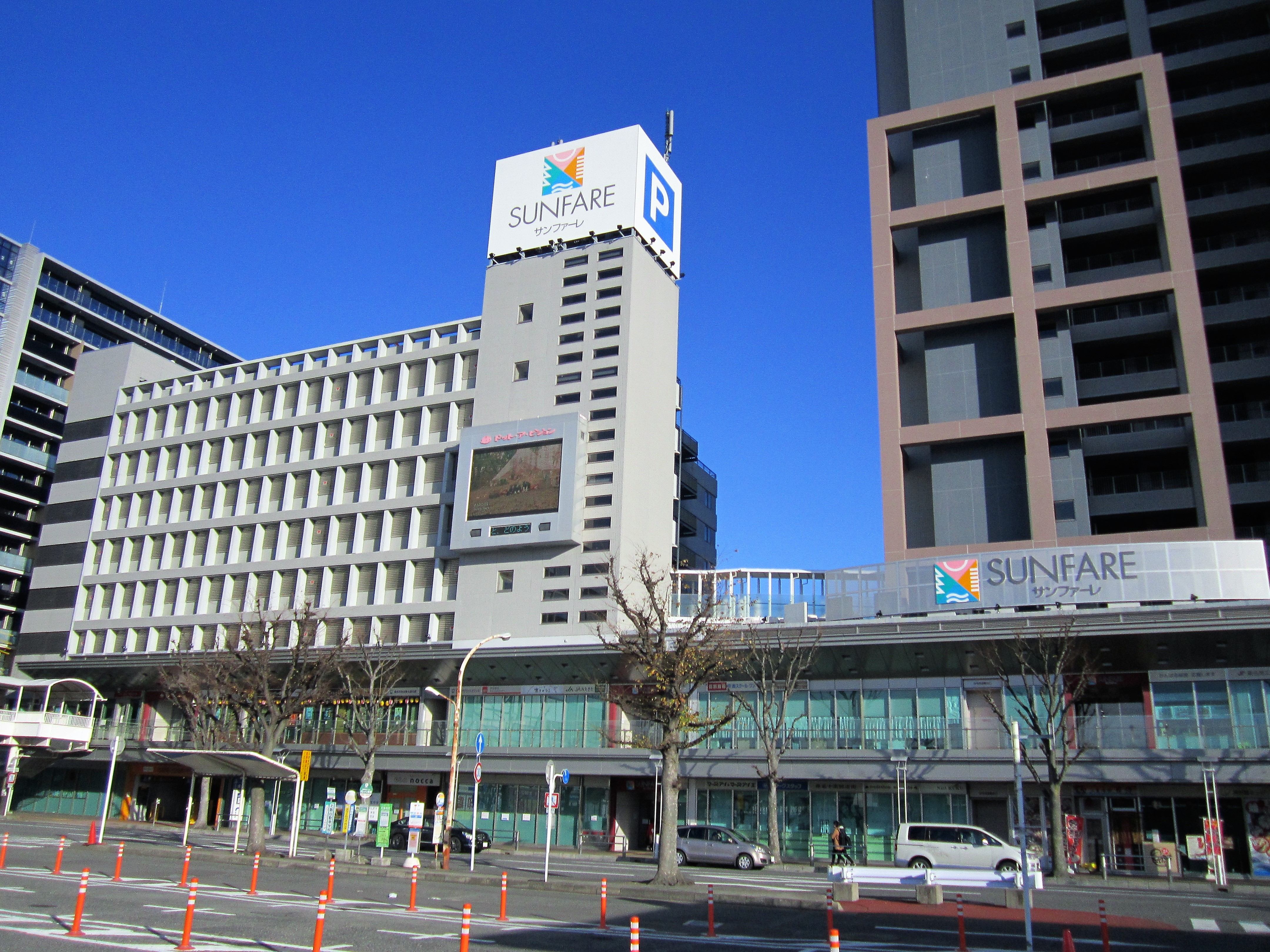 桑名駅前の複合商業施設 サンファーレ Canon PowerShot A2200